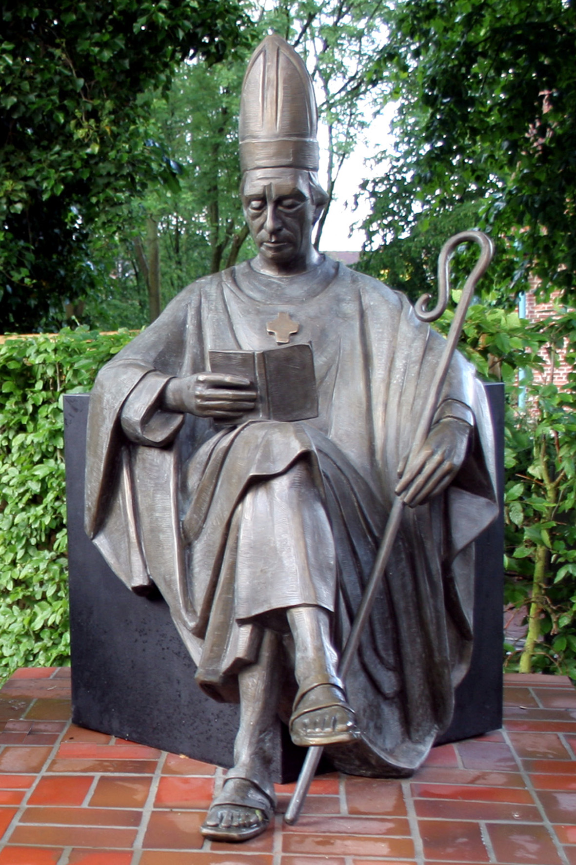 "Erz-Abt zu Harsefeld" - Bronze - lebensgroß. Das Denkmal von Bildhauer Carsten Eggers bereichert seit Juni 2009 den Harsefelder Klosterplatz. Das im Jahr 1002 erbaute Kloster unterstand seinerzeit direkt dem Papst, wurde seit Ende des 14. Jahrhunderts bis zu seiner Aufhebung 1647 von Erz-Äbten geleitet. Stellvertretend für alle hat Bildhauer Carsten Eggers aus Nottensdorf eine Bronzeskulptur geschaffen.